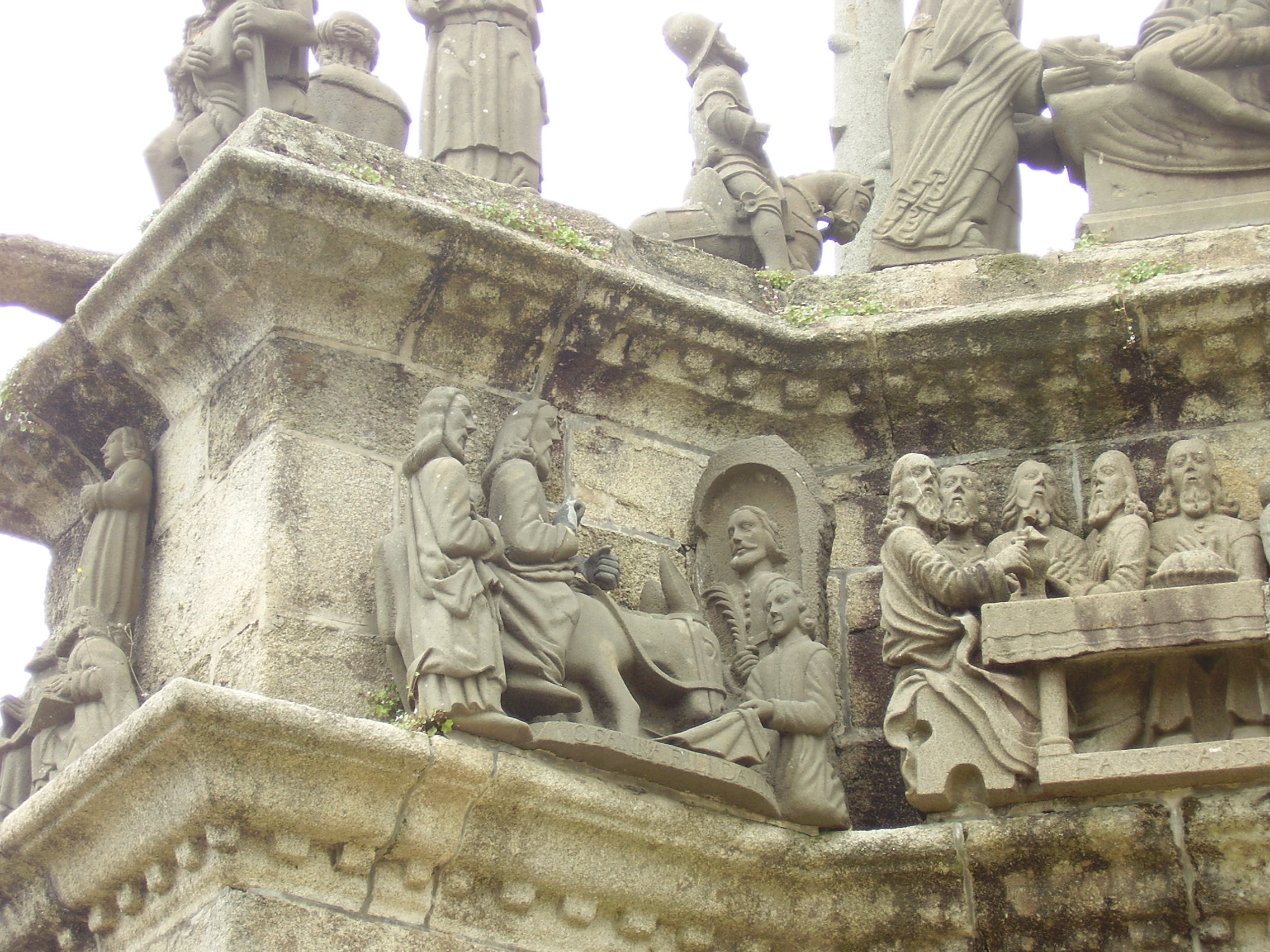 Pleyben, Pfarrbezirk mit monumentaler Calvaire und Kirche, Frankreich; Calvaire